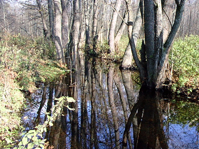 Rzeka Łutownia w pobliżu wsi Budy